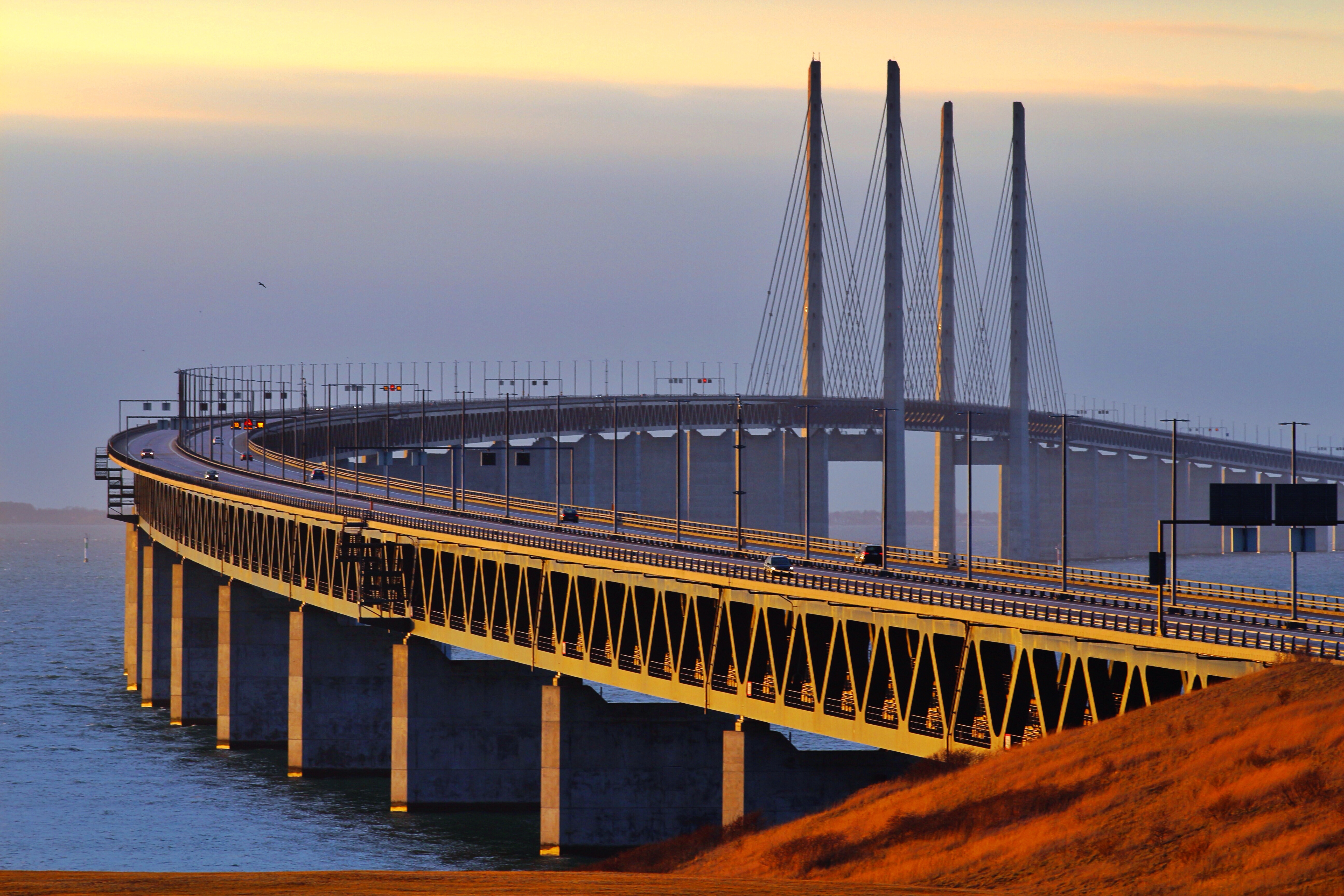 Öresund bridge